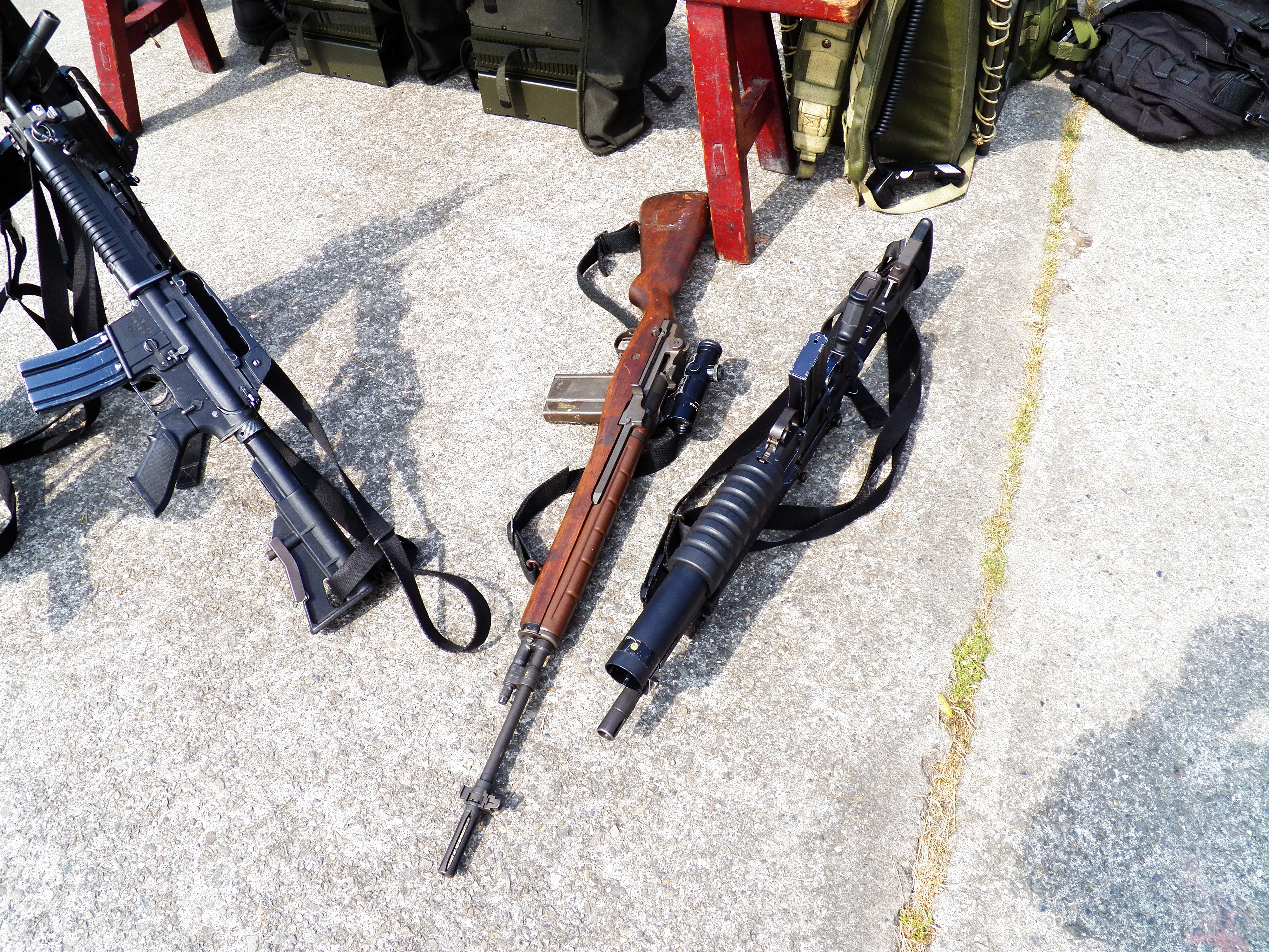 2012年陸軍步兵學校營區開放活動的特戰小組裝備展示，中間是加裝瞄準鏡的狙擊用57式步槍，右側是加裝T85榴彈發射器後槍底朝上的91式戰鬥步槍，左側是91式戰鬥步槍三角架。